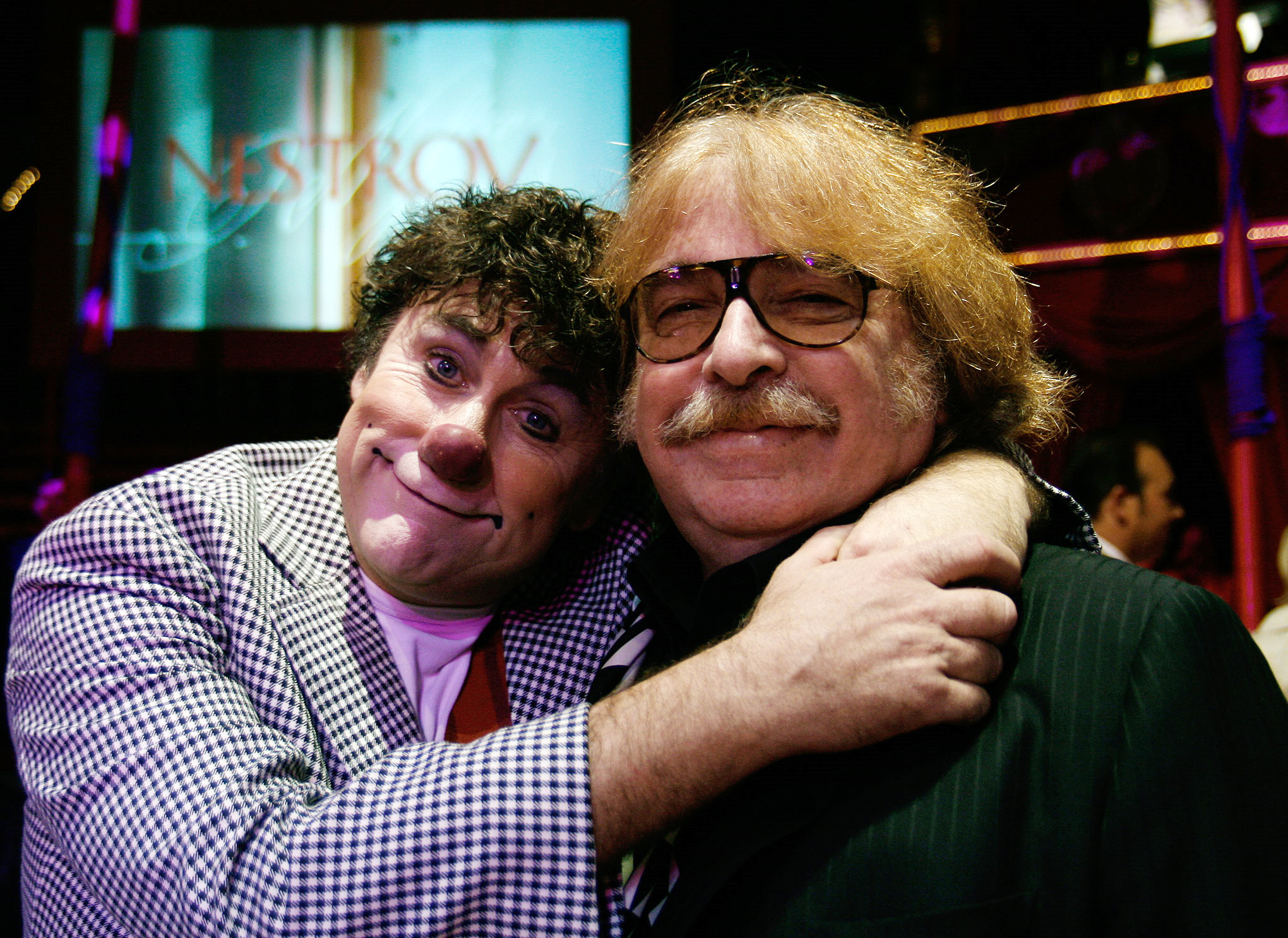 Zirkusgründer und -direktor Bernhard Paul und Clown David Larible während der Verleihung des Nestroy-Theaterpreises 2009 (Circus Roncalli auf dem Wiener Rathausplatz).